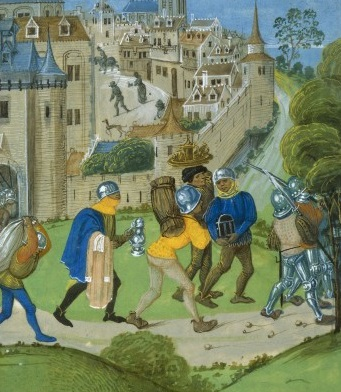 Sac de Montferrand en 1388 par Perrot le béarnais. Détail d'une enluminure issu des Chroniques de Jean Froissart. Vers 1450-1470.